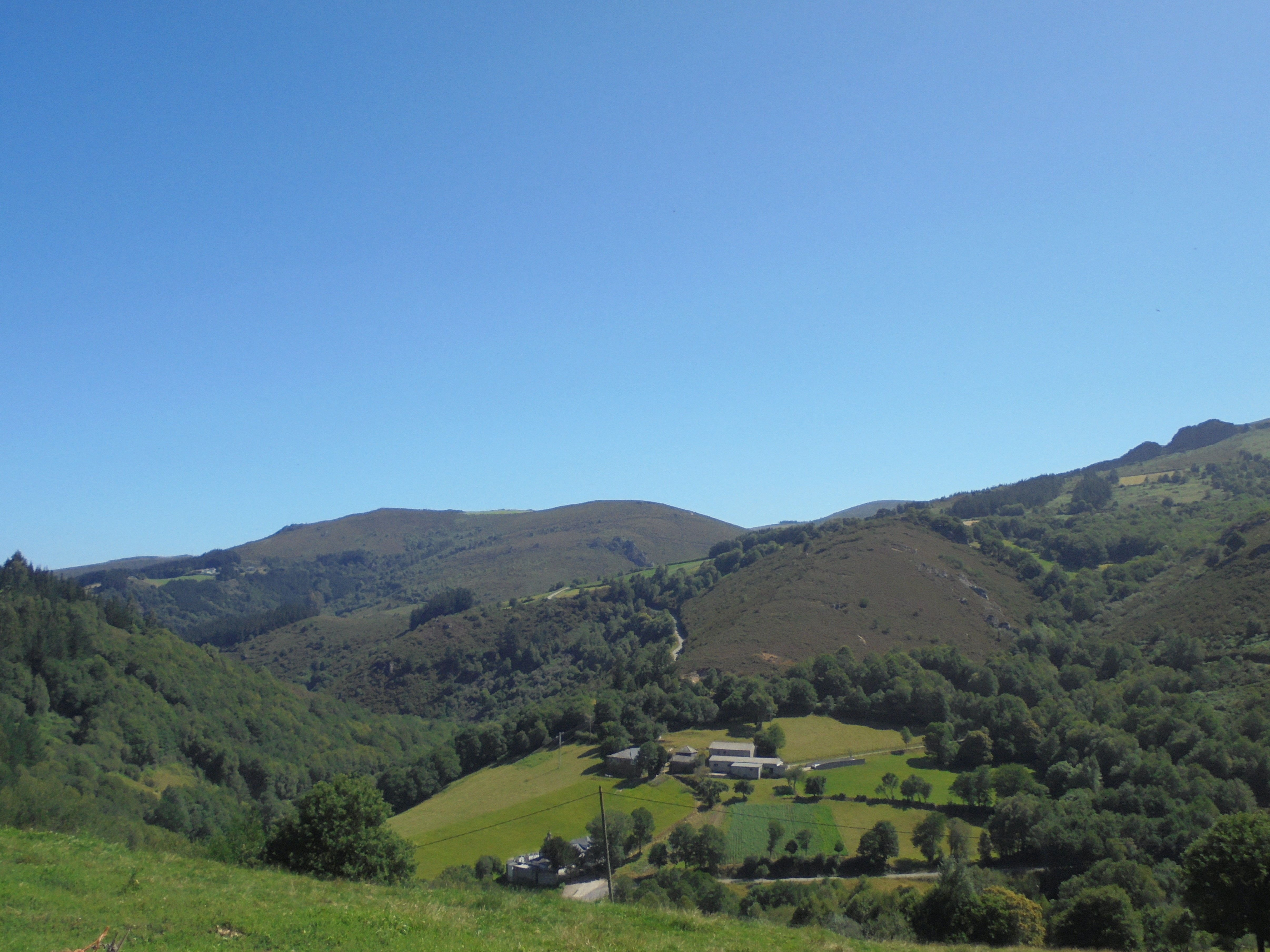 Vista desde Trembedo - Cubilledo